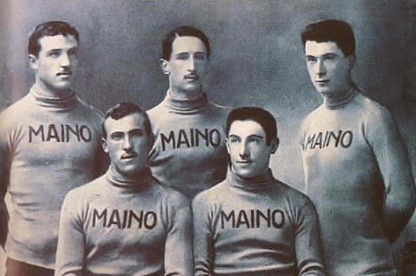 Squadra della Maino al Giro d'Italia 1913